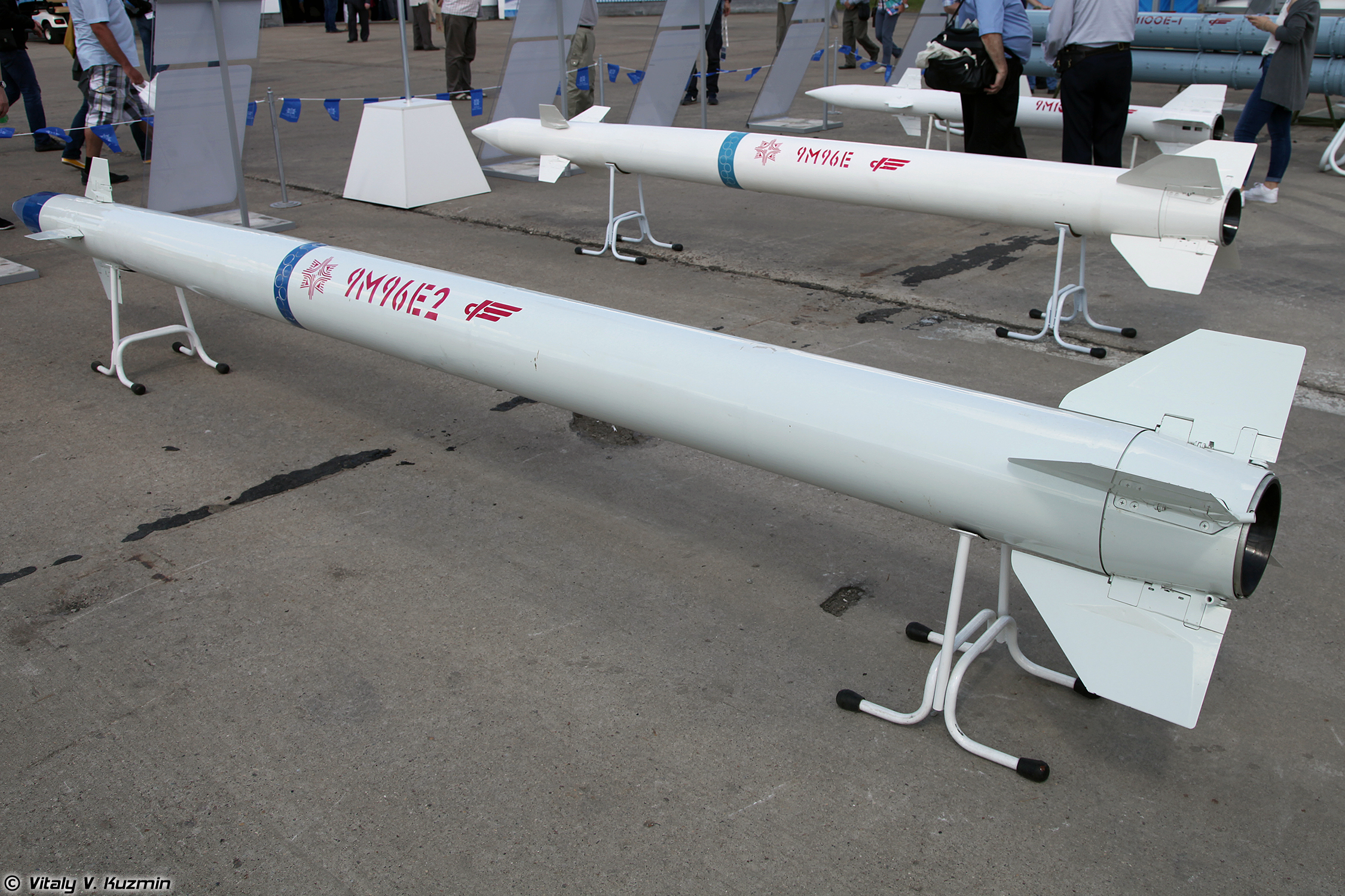 ЗУР 9М96Е2 с увеличенной дальностью пуска (9M96E2 SAM with increased range)